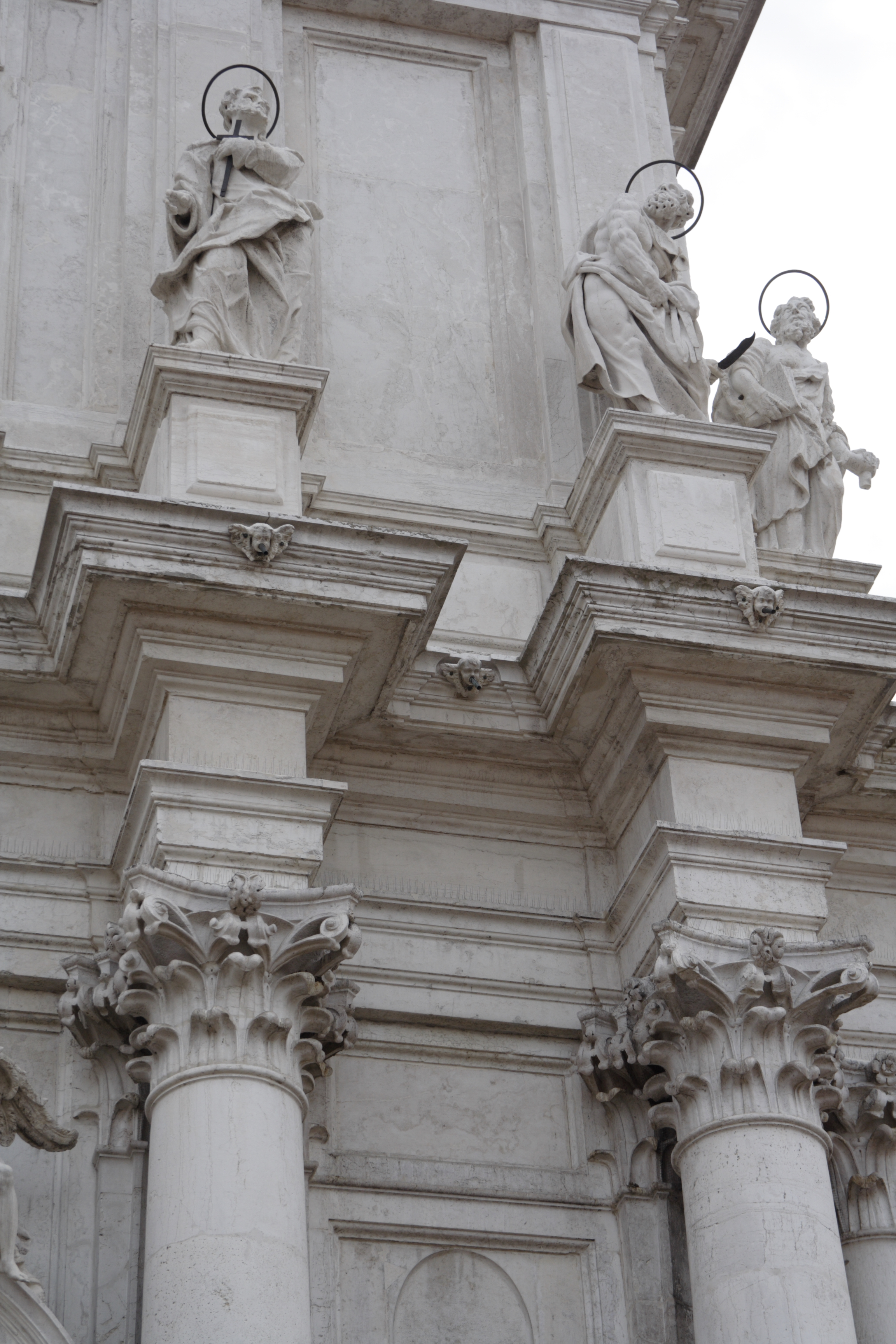 Chiesa di Santa Maria Assunta detta I Gesuiti. Front